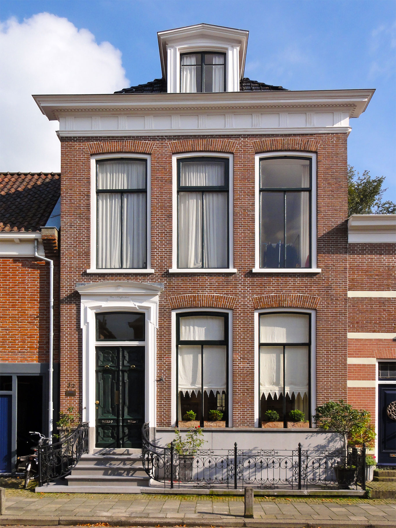 Legeweg 32 Dokkum, rijksmonument